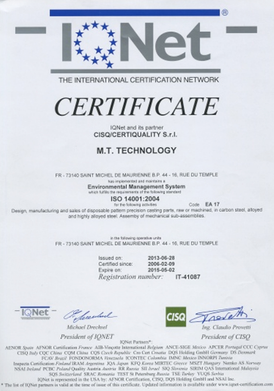 ISO 14001